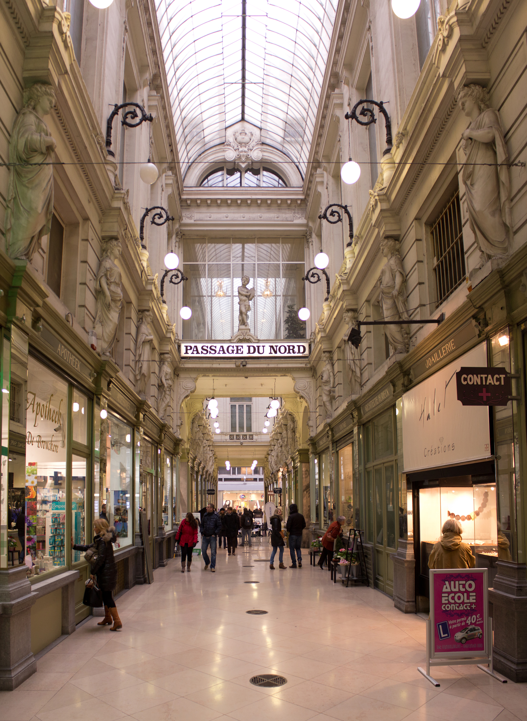 Noordergallerij, Brussel